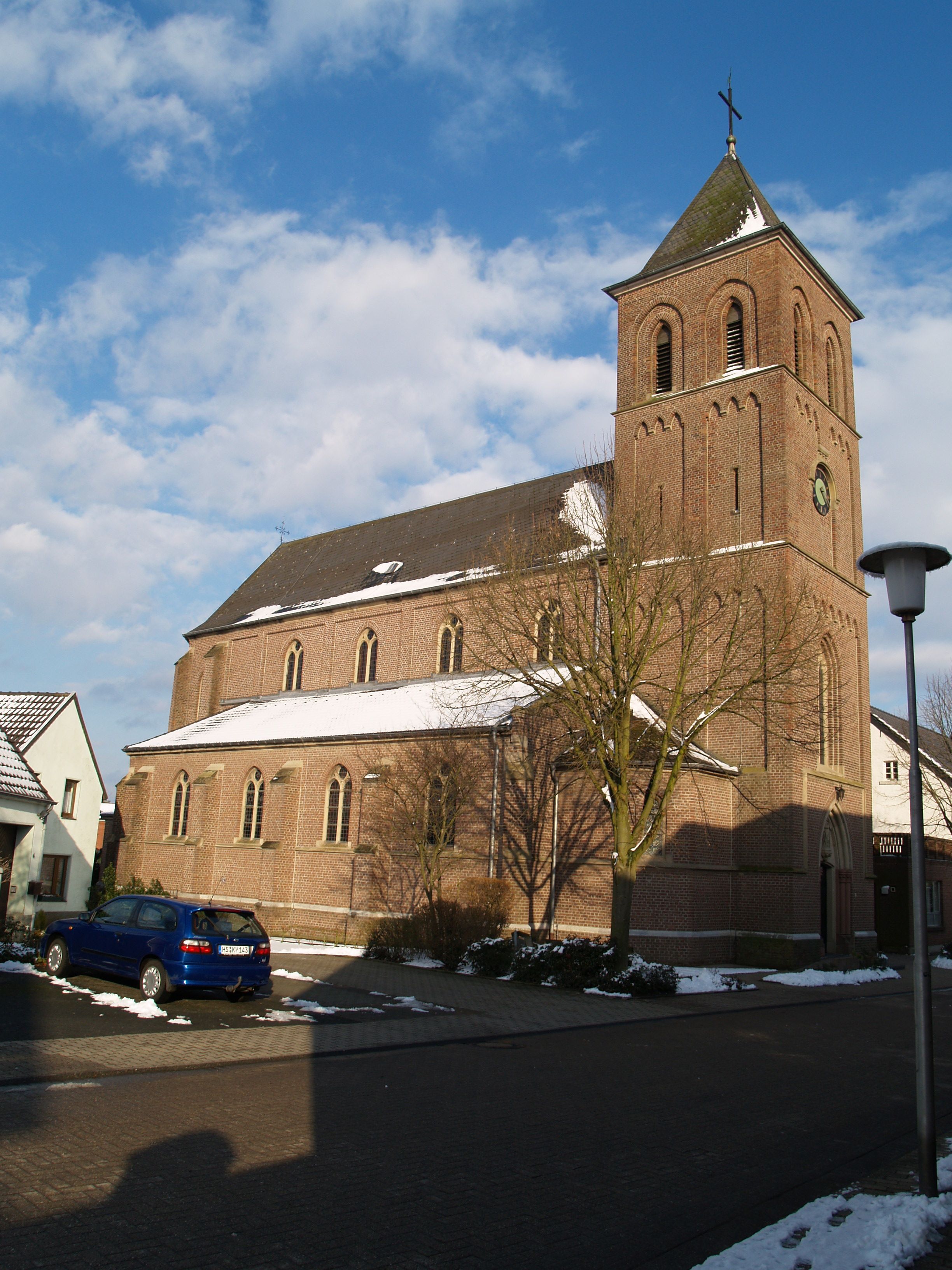 St Joseph Bocket